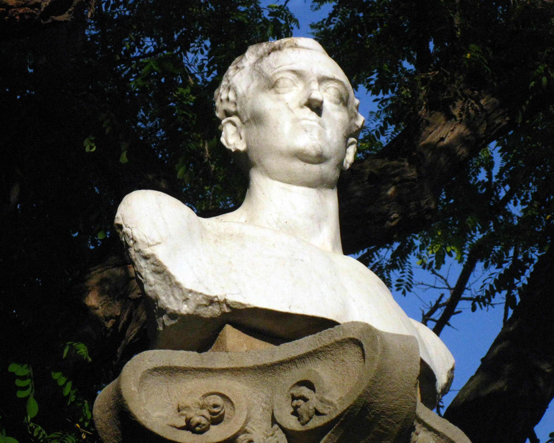 A Lleó Fontova (Pau Gargallo). Parc de la Ciutadella (Barcelona)